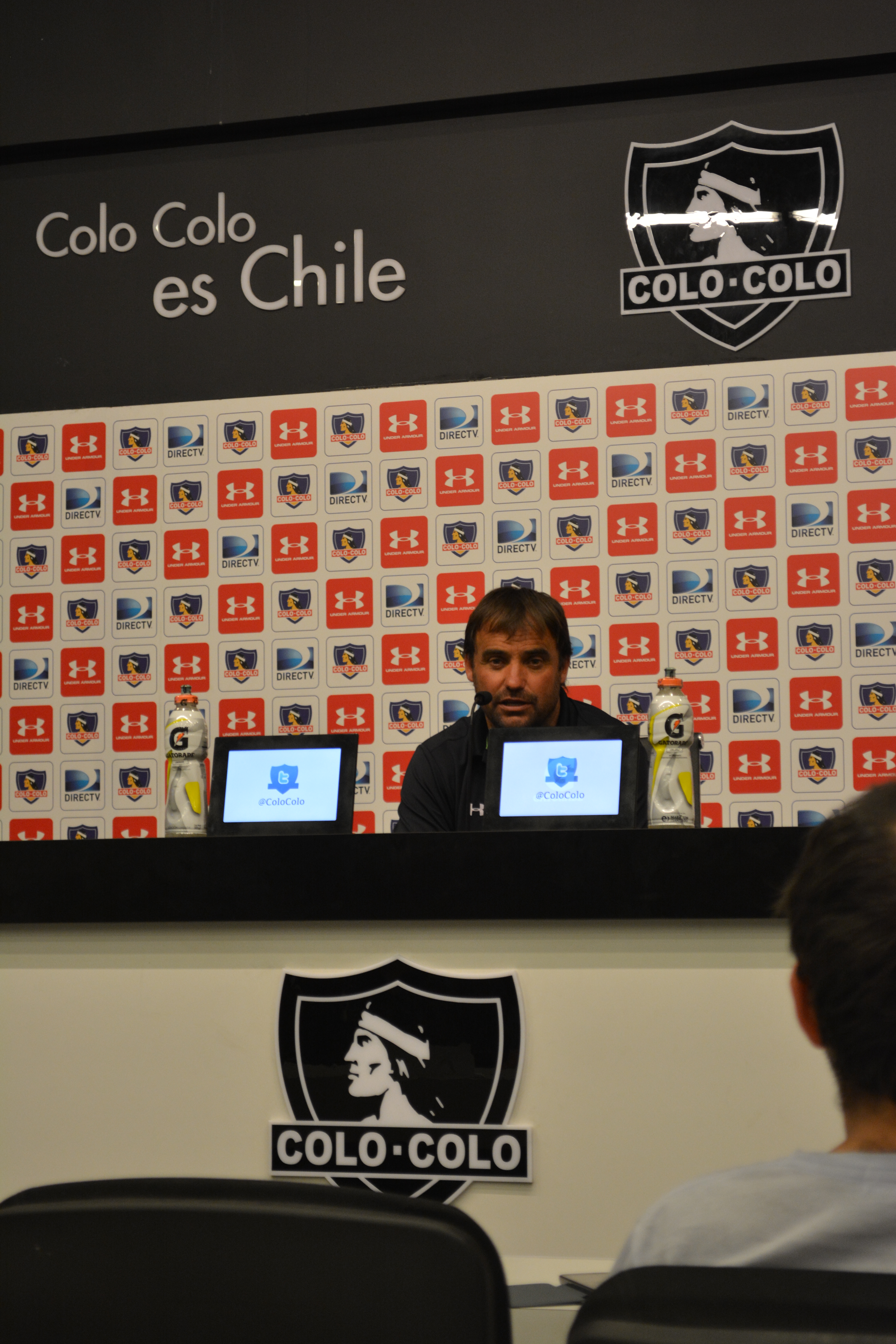 Colo Colo - Universidad de Concepción, 29-11-2015, Estadio Monumental, Santiago, Chile